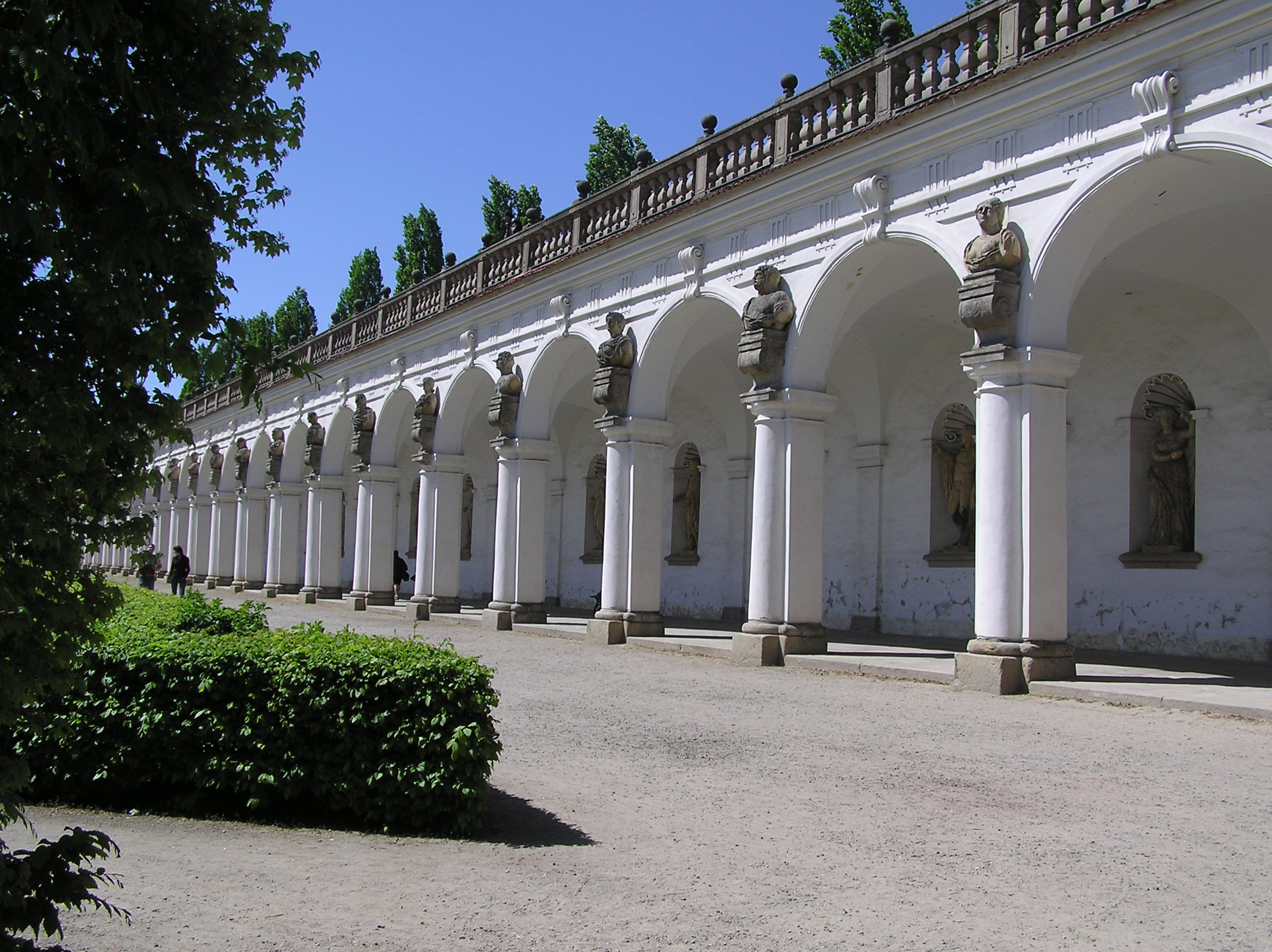 Květná zahrada v Kroměříži, kolonáda; The Flover Garden in Kroměříž